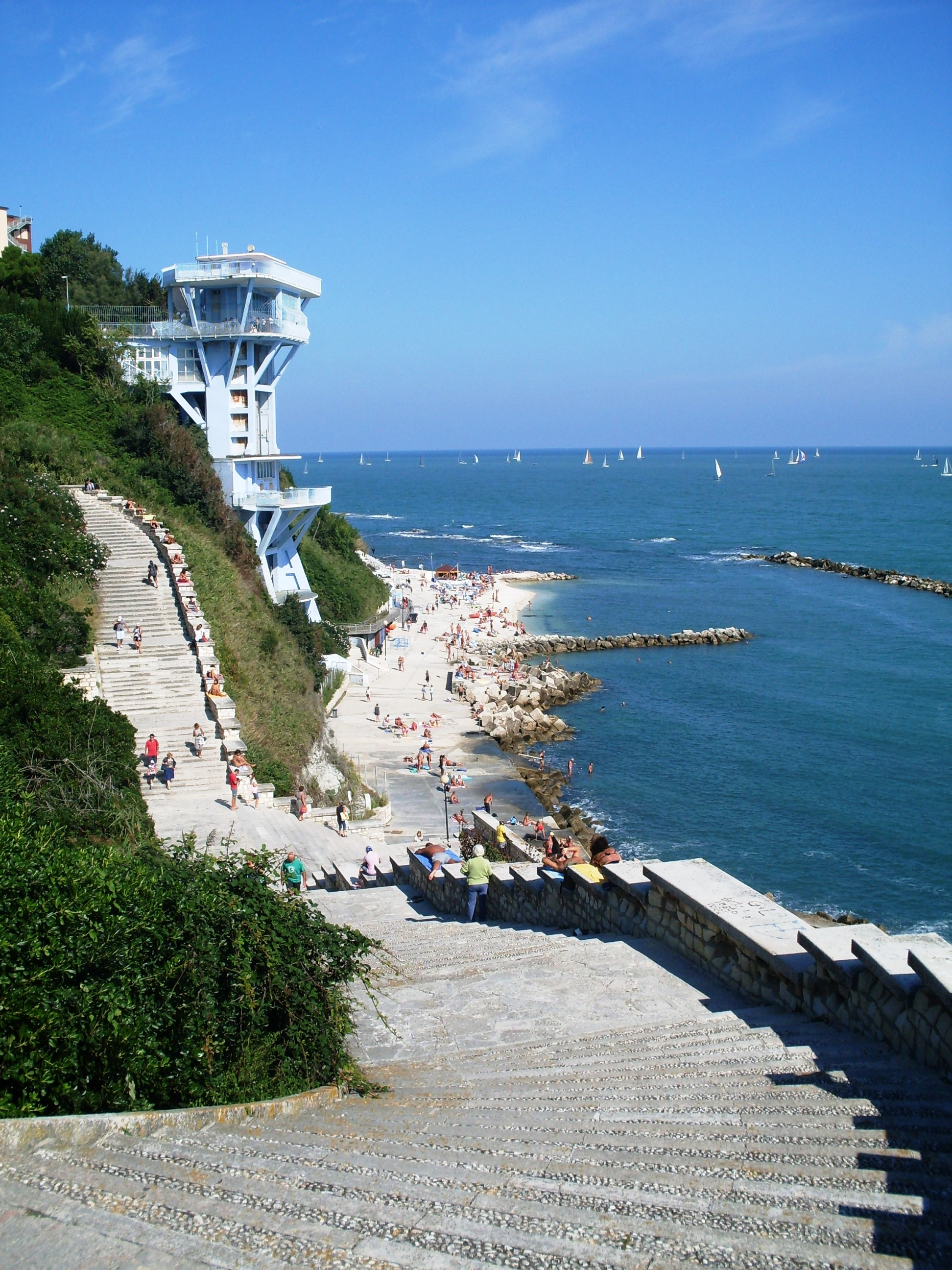 Passetto scalinata e regata